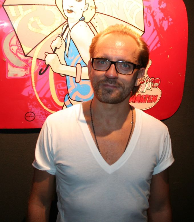 Sven Väth bei der Vernissage "Go Figure" im Frankfurter Cocoon-Club